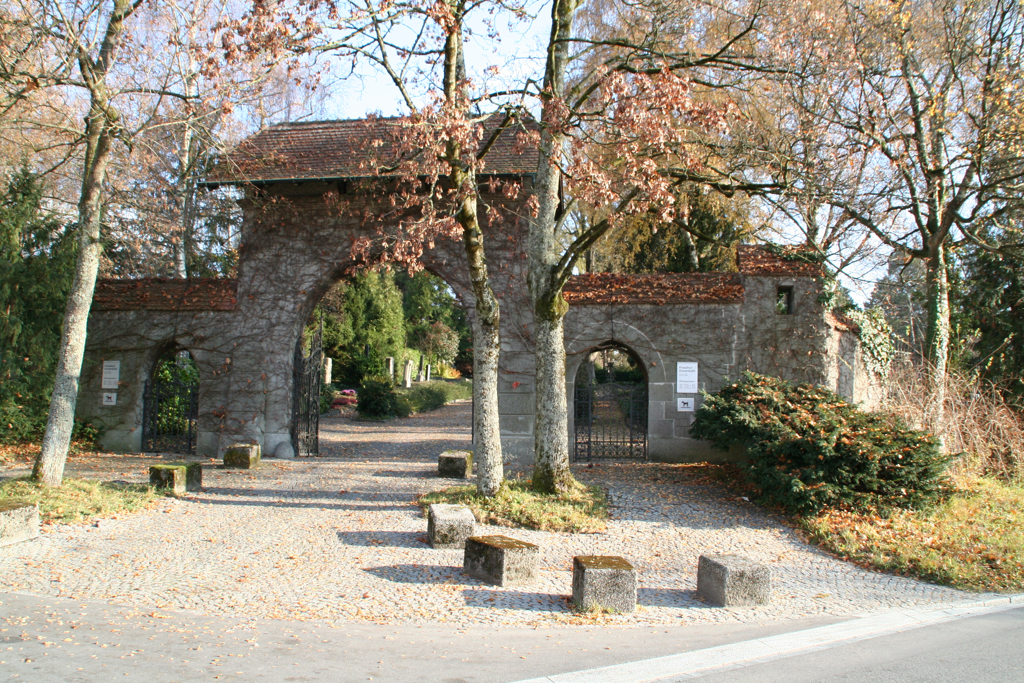 Friedhof Enzenbühl in Zürich unterer Eingang